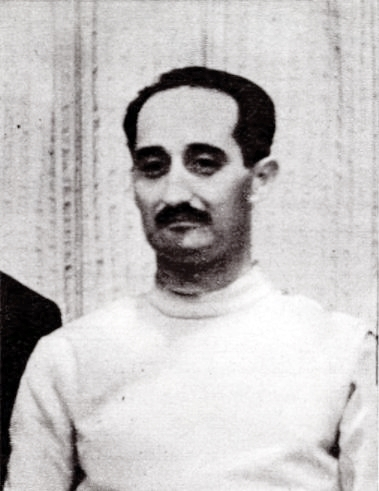 Bay Béla vívó 1941-ben